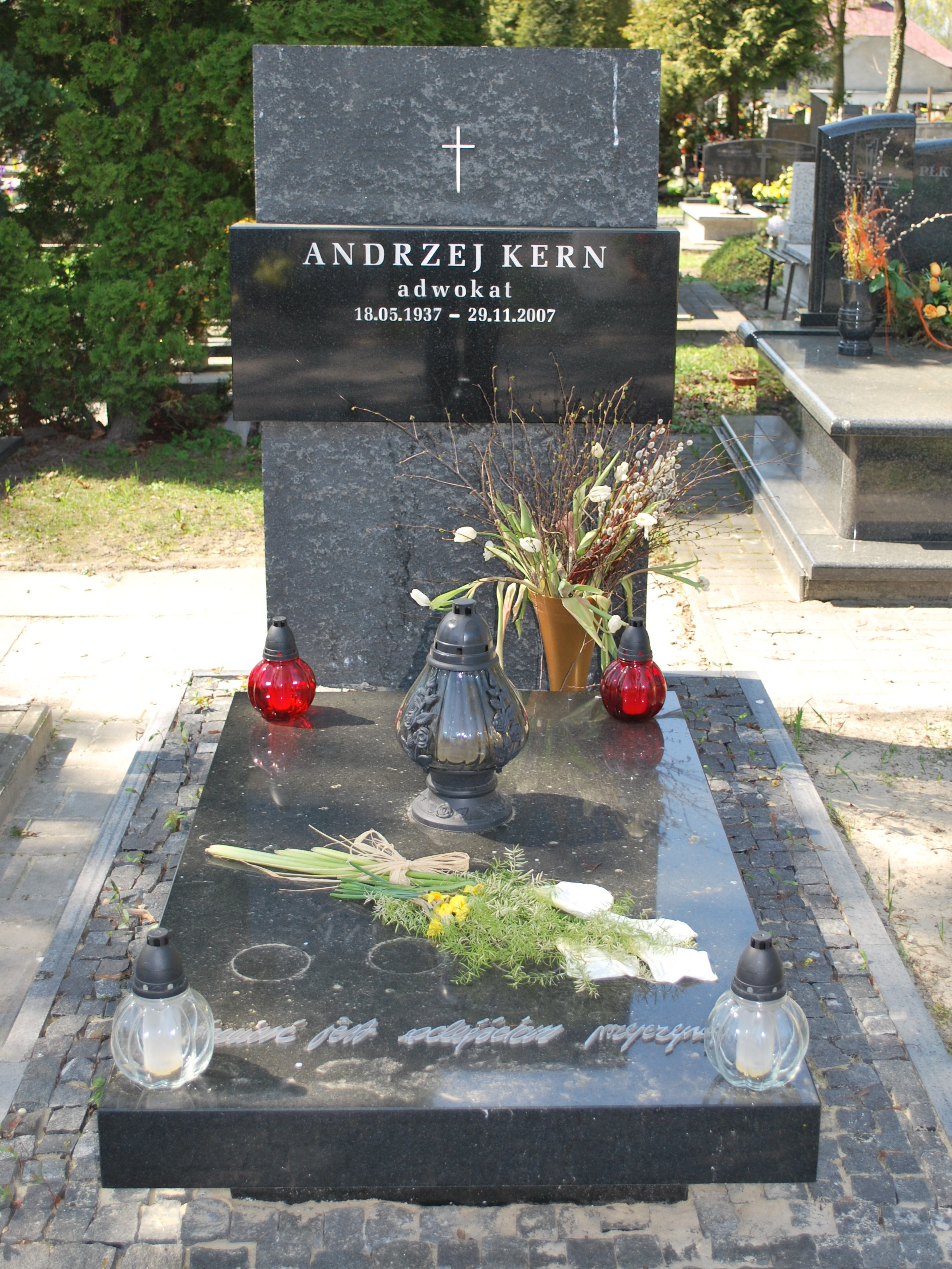 Nagrobek Andrzeja Kerna